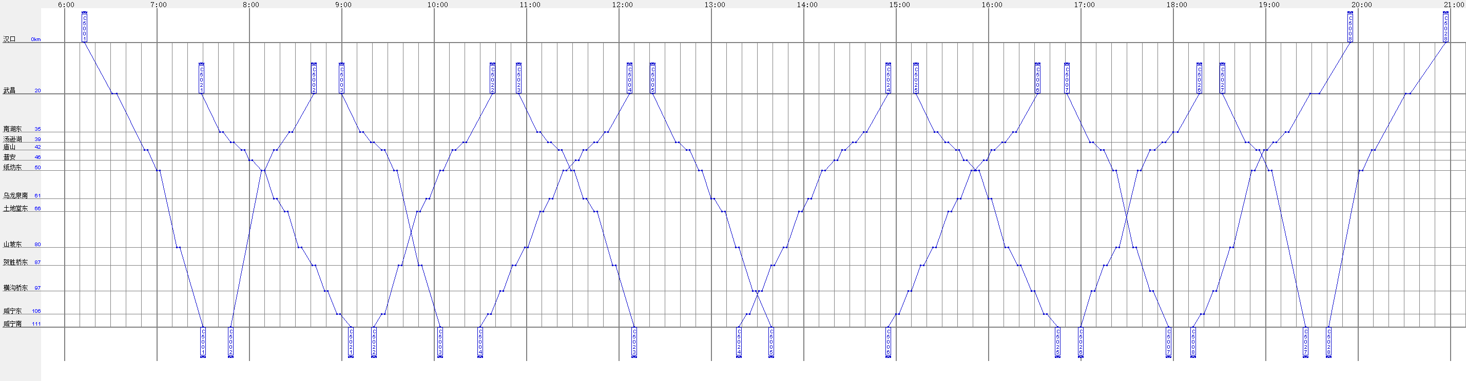 武咸城际铁路于2017年3月8日启用的新运行图